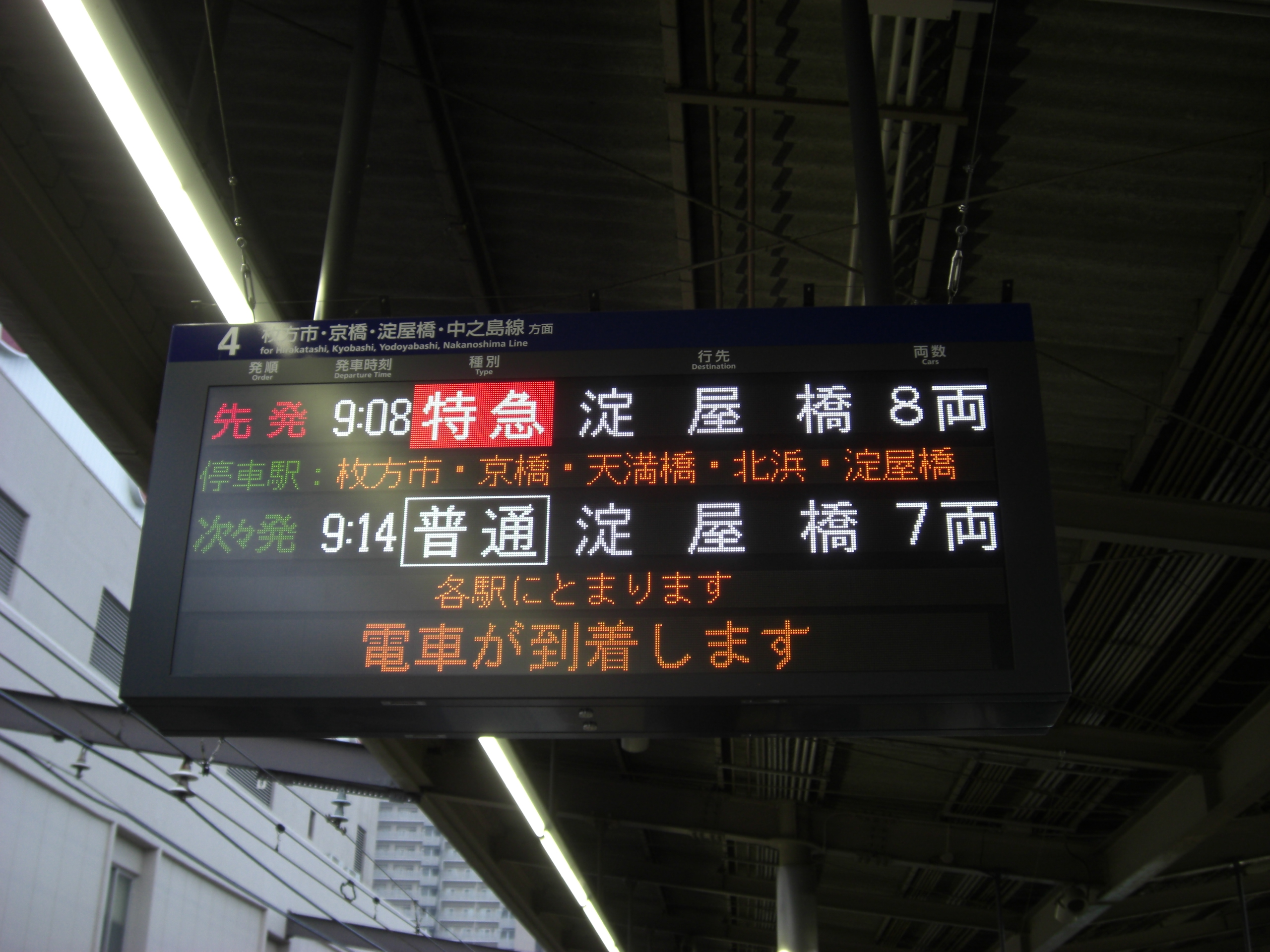 樟葉駅4番線 発車標